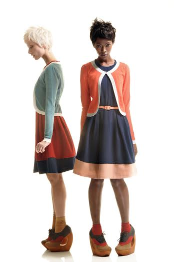 מיצג אופנה של נעמה בצלאל